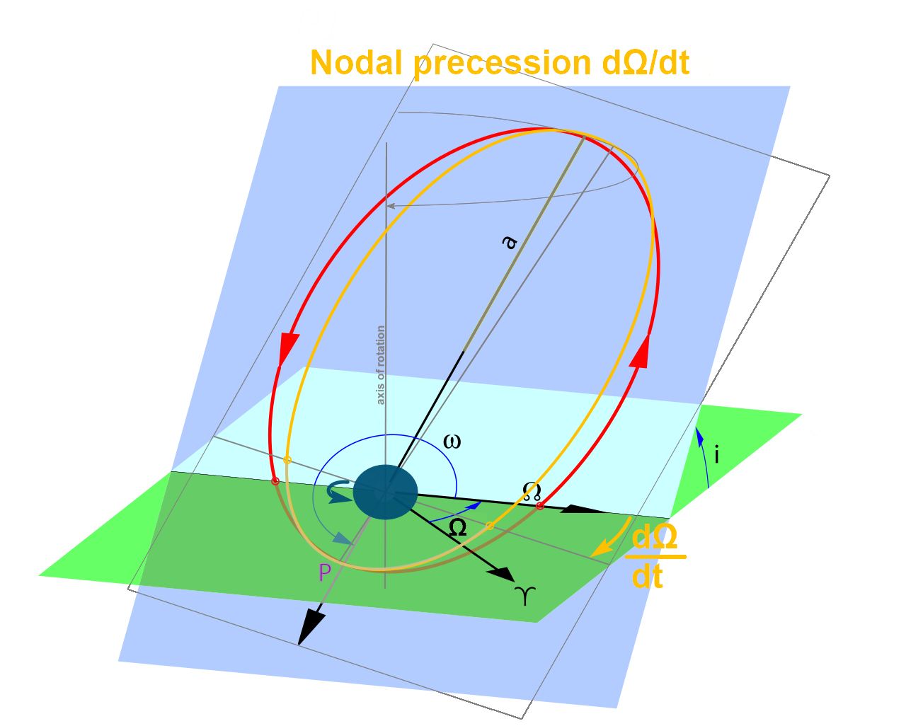 Nodal precesion figure